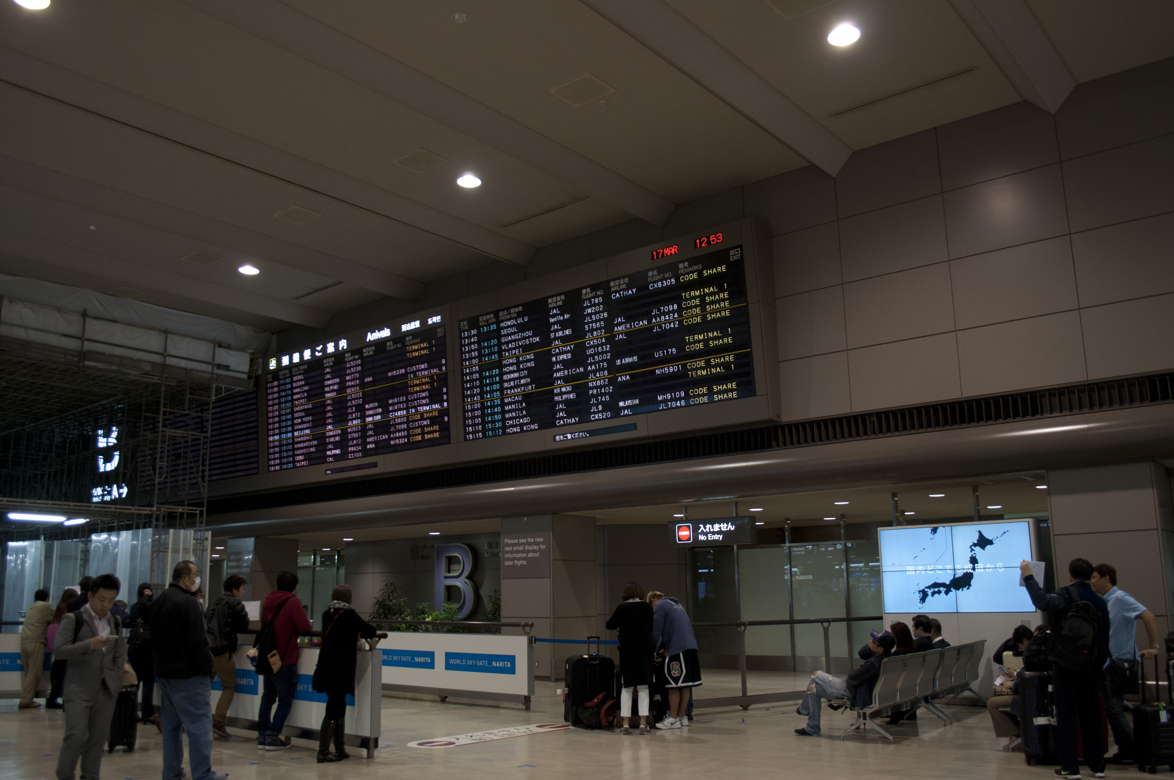 成田空港第2ターミナル到着ゲートB